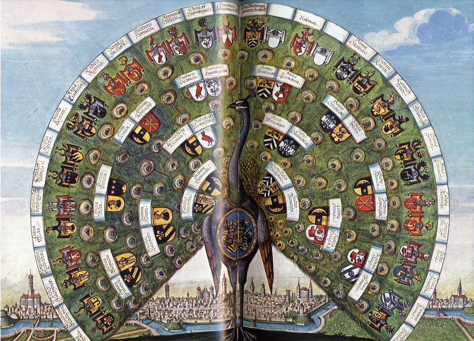 Stammbeschreibung des Hainhofer Geschlechts, 1629, Ahnentafel Philipp Hainhofers, Ratsherr zu Augsburg. Augsburg, Staats- und Stadtbibliothek